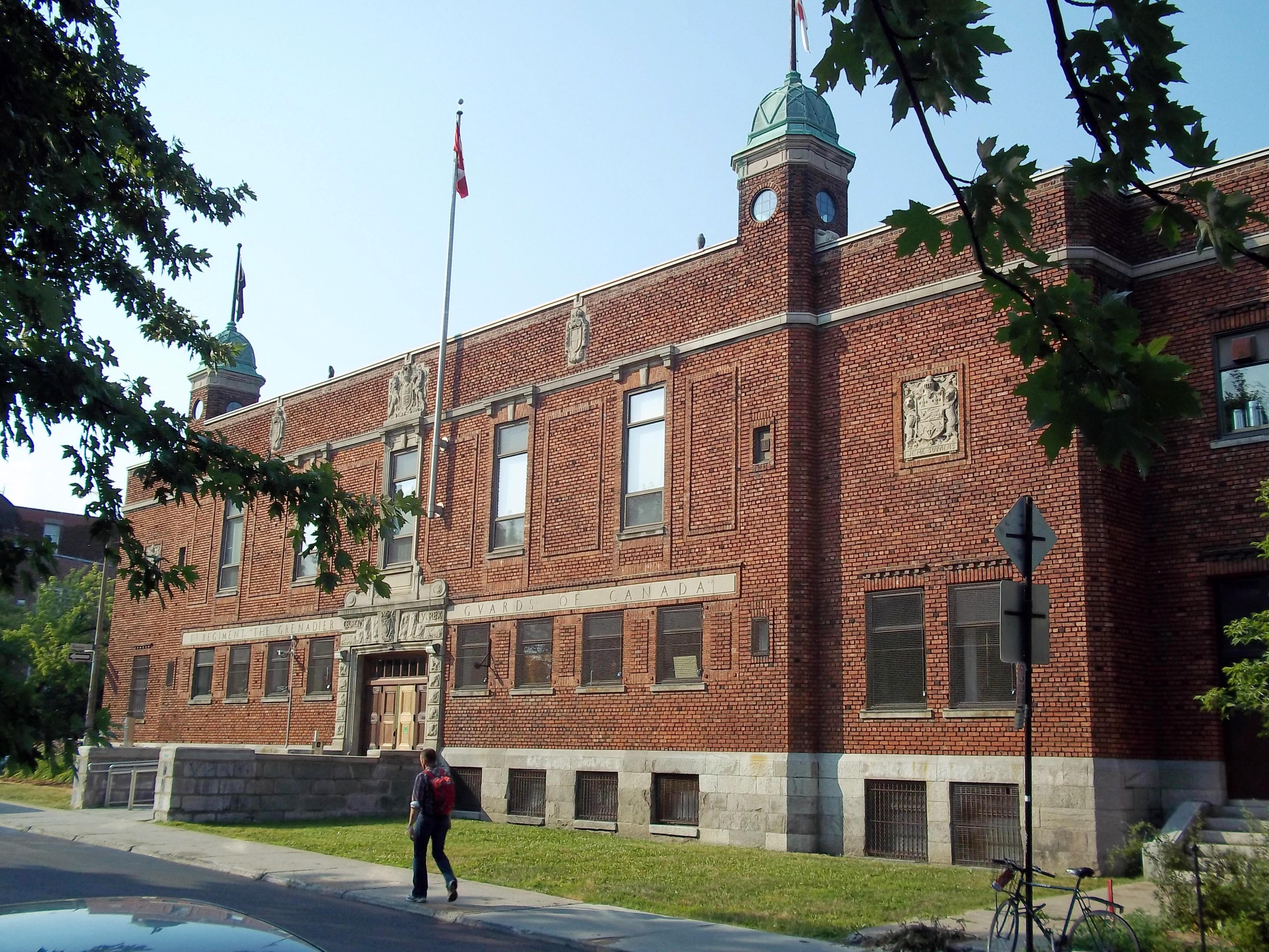 Manège militaire The Canadian Grenadier Guards, 4171 avenue de l'Esplanade, Montréal